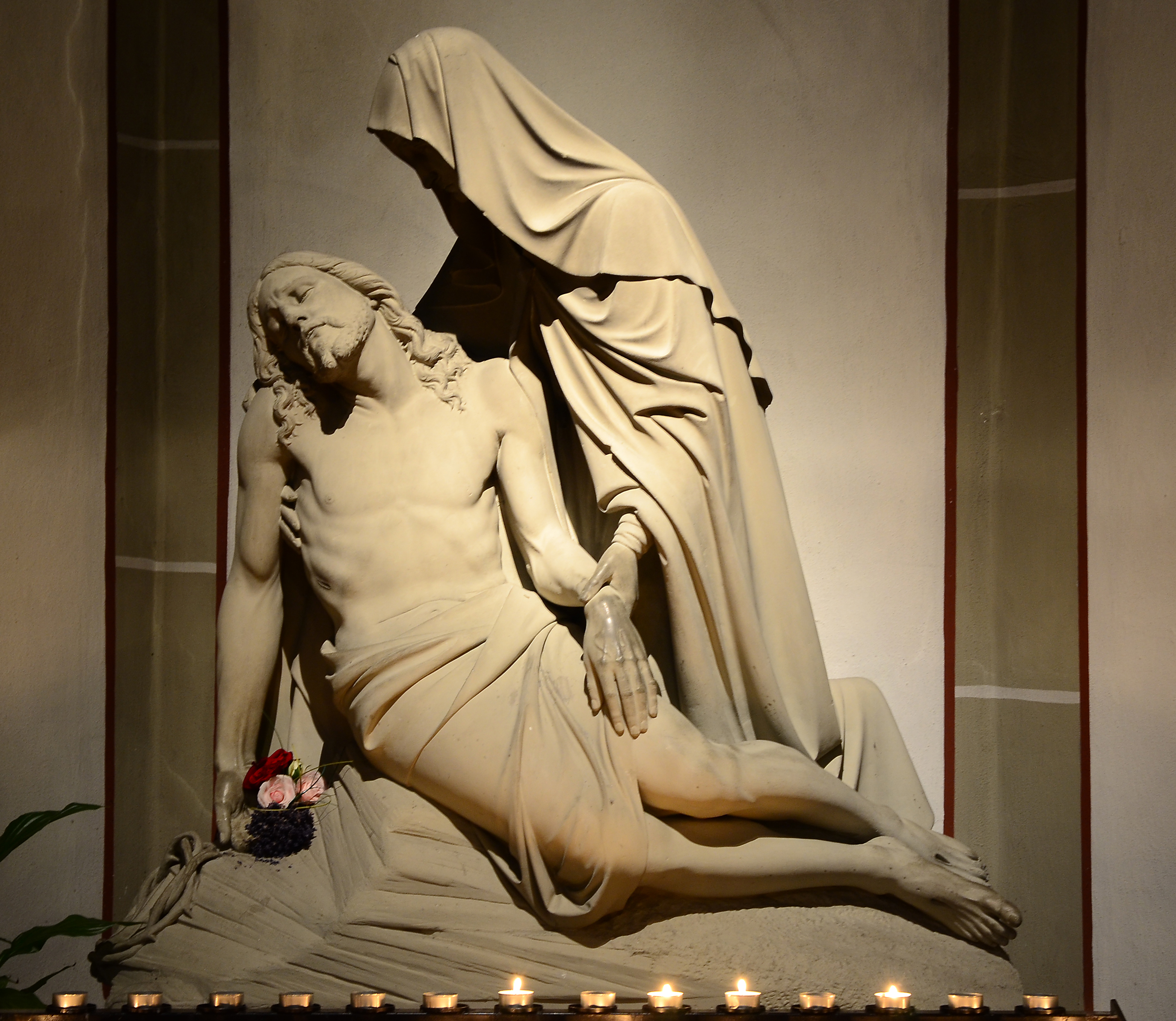 Denkmalgeschützte Basilika Mariä Heimsuchung (Werl), Pieta in der Andachtskapelle (4)